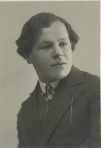 France Kralj (1895-1960), Slovene painter and sculptor.